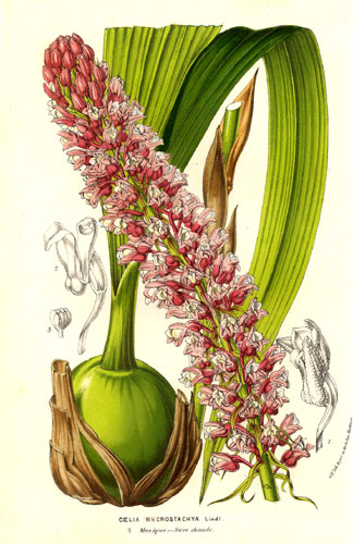 From: "Flore des serres et des jardins de l’Europe" by Charles Lemaire and others. Gent, Louis van Houtte, 1854, volume 9 (plate 900).